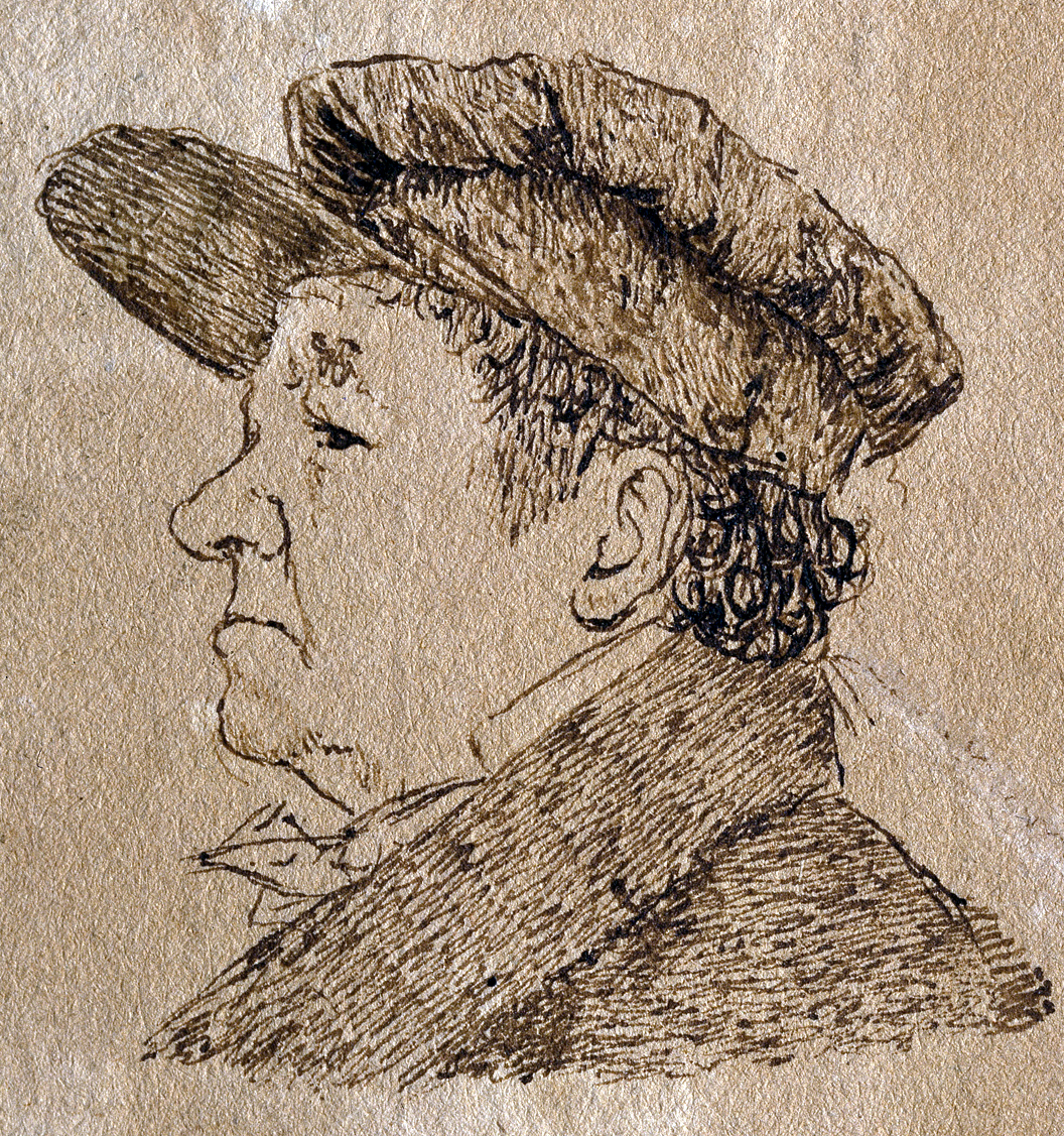 Autorretrato con gorra de 1824, pluma y tinta marrón sobre papel, 84 x 69 mm.